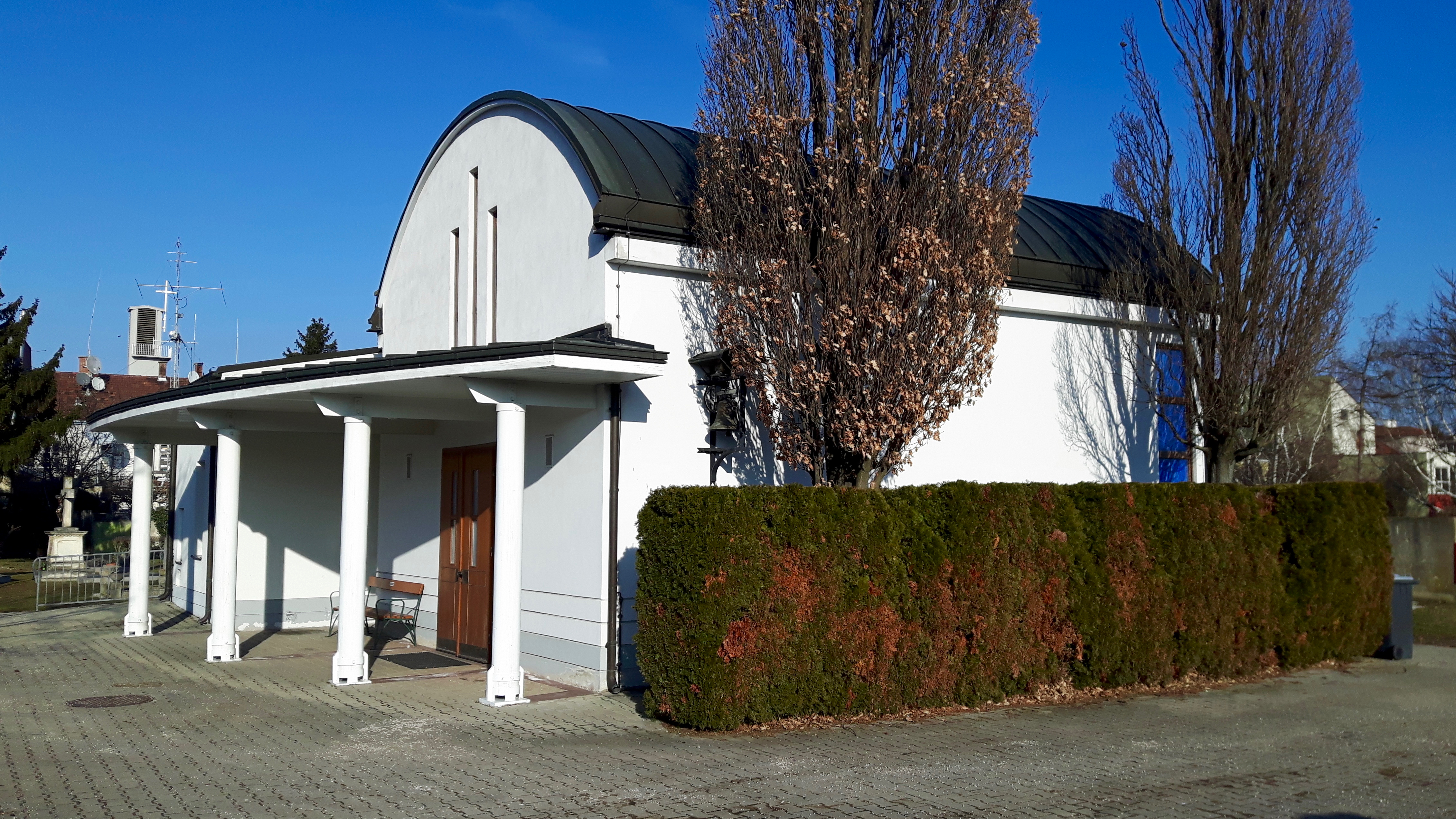 Aufbahrungshalle am Friedhof Siebenhirten in Wien.